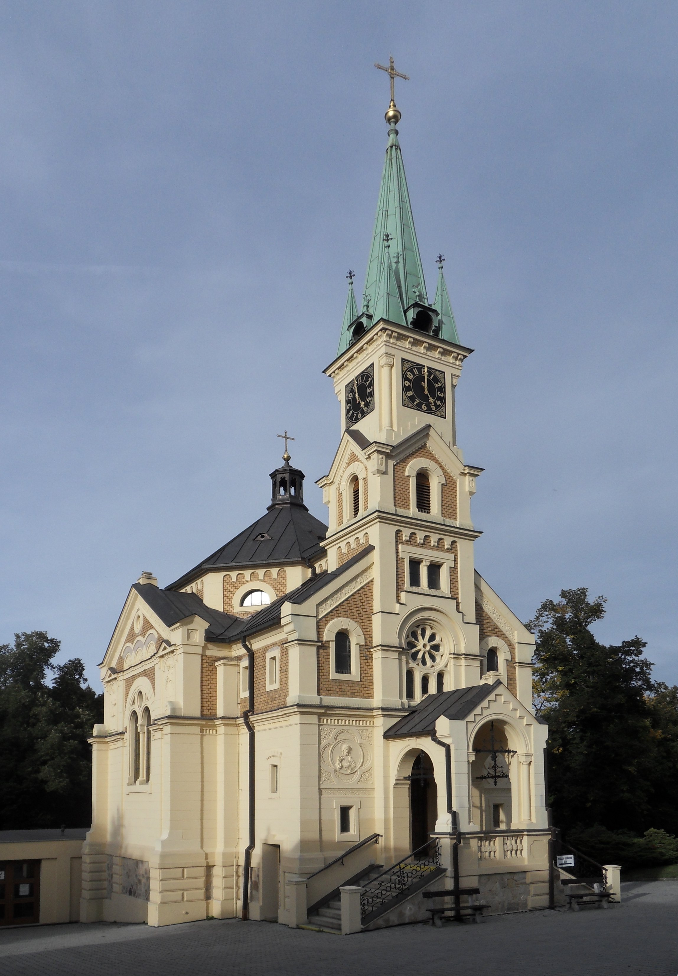 Kaple sv. Václava na na Ústředním hřbitově, Plzeň